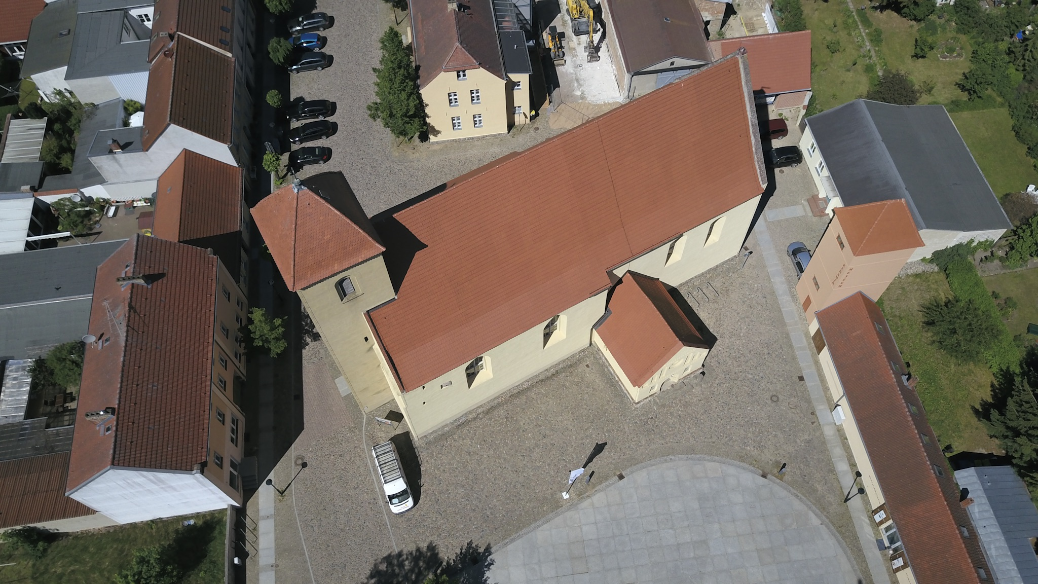 Die aus dem 13. Jh. stammende evangelische Kirche St. Laurentius aus der Perspektive von schräg oben.